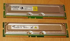 rimm